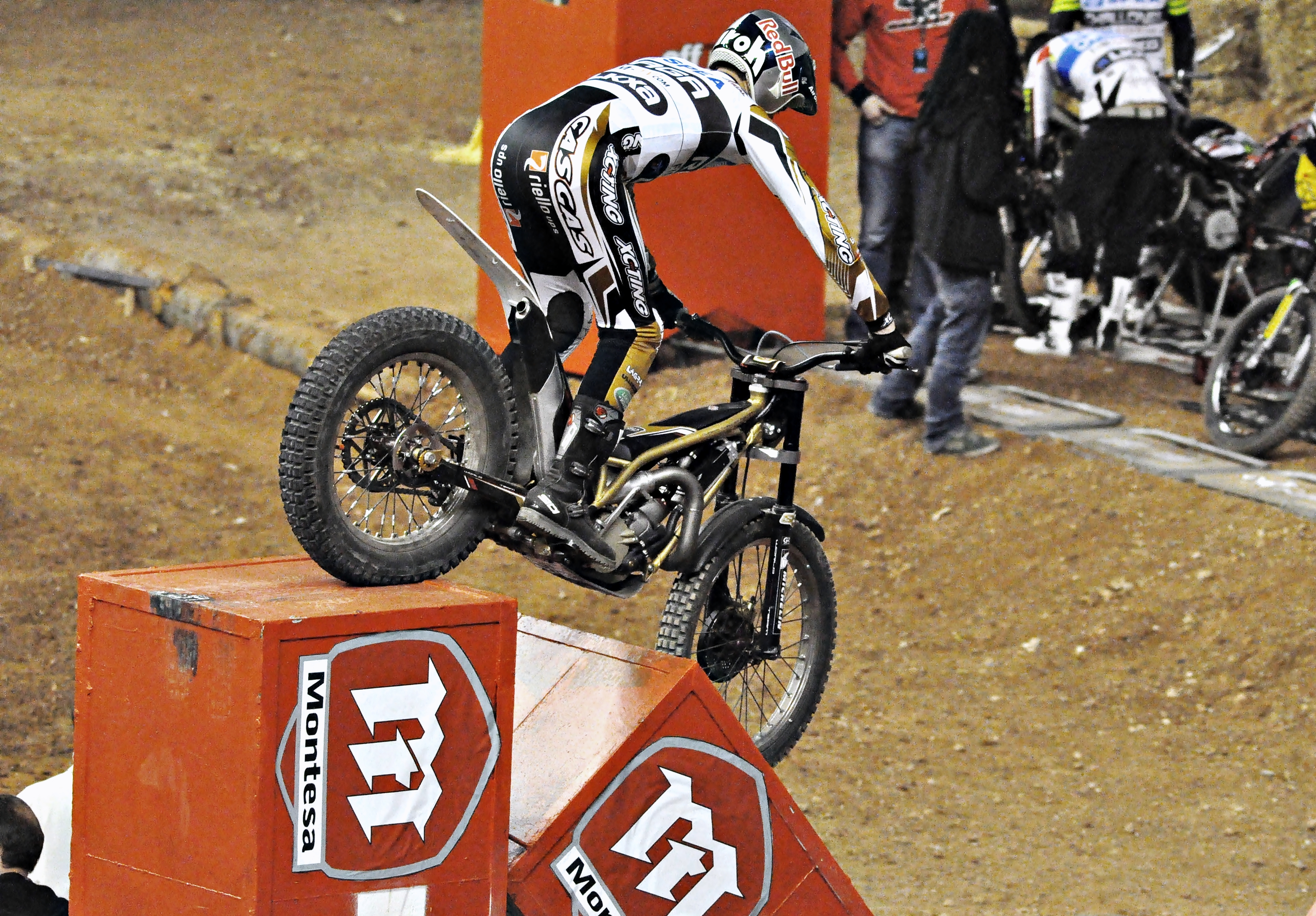 trial indoor de barcelona-2011